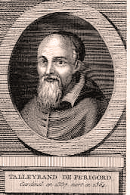 Cardinal Hélie de Talleyrand-Périgord